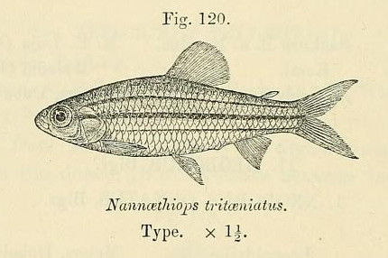 Neolebias trilineatus